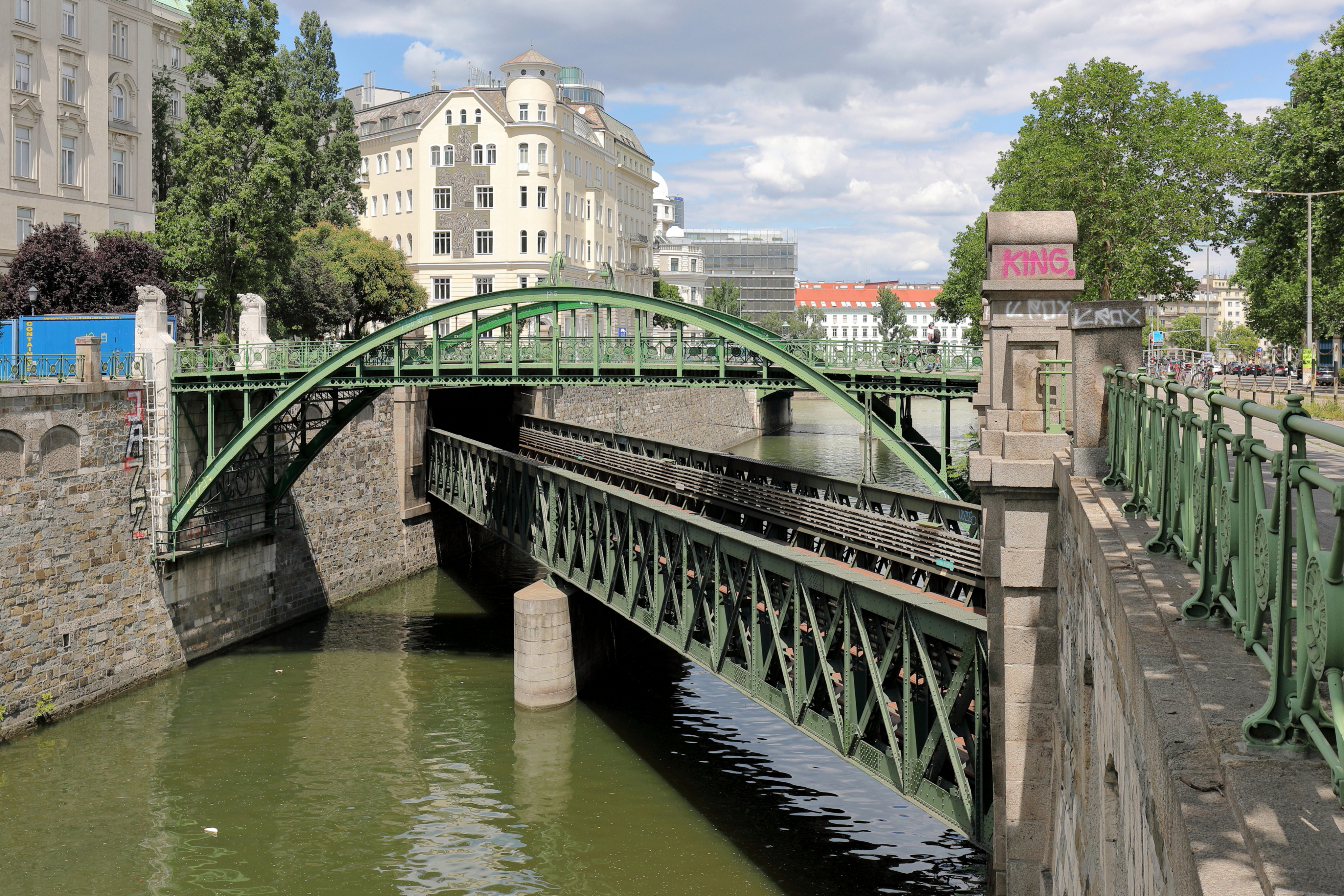 Südansicht der Zollamtsbrücke und des Zollamtsstegs an der Bezirksgrenze des 1. Wiener Bezirks Innere Stadt und 3. Bezirks Landstraße. Die beiden Brückenbauwerke überqueren den Wienfluss kurz vor dessen Einmündung in den Donaukanal. Benannt sind sie nach dem ehemaligen Hauptzollamt, weil der Steg es mit der Innenstadt verband. Der Steg wurde im Zuge der Regulierung des Wienflusses und des Baus der Stadtbahn im Jahr 1900 von Martin Paul (Konstruktion) und Josef Hackhofer sowie Friedrich Ohmann (Architektur) errichtet. Die schräg darunter verlaufende Brücke stammt von Otto Wagner und wurde ebenfalls 1900 errichtet.